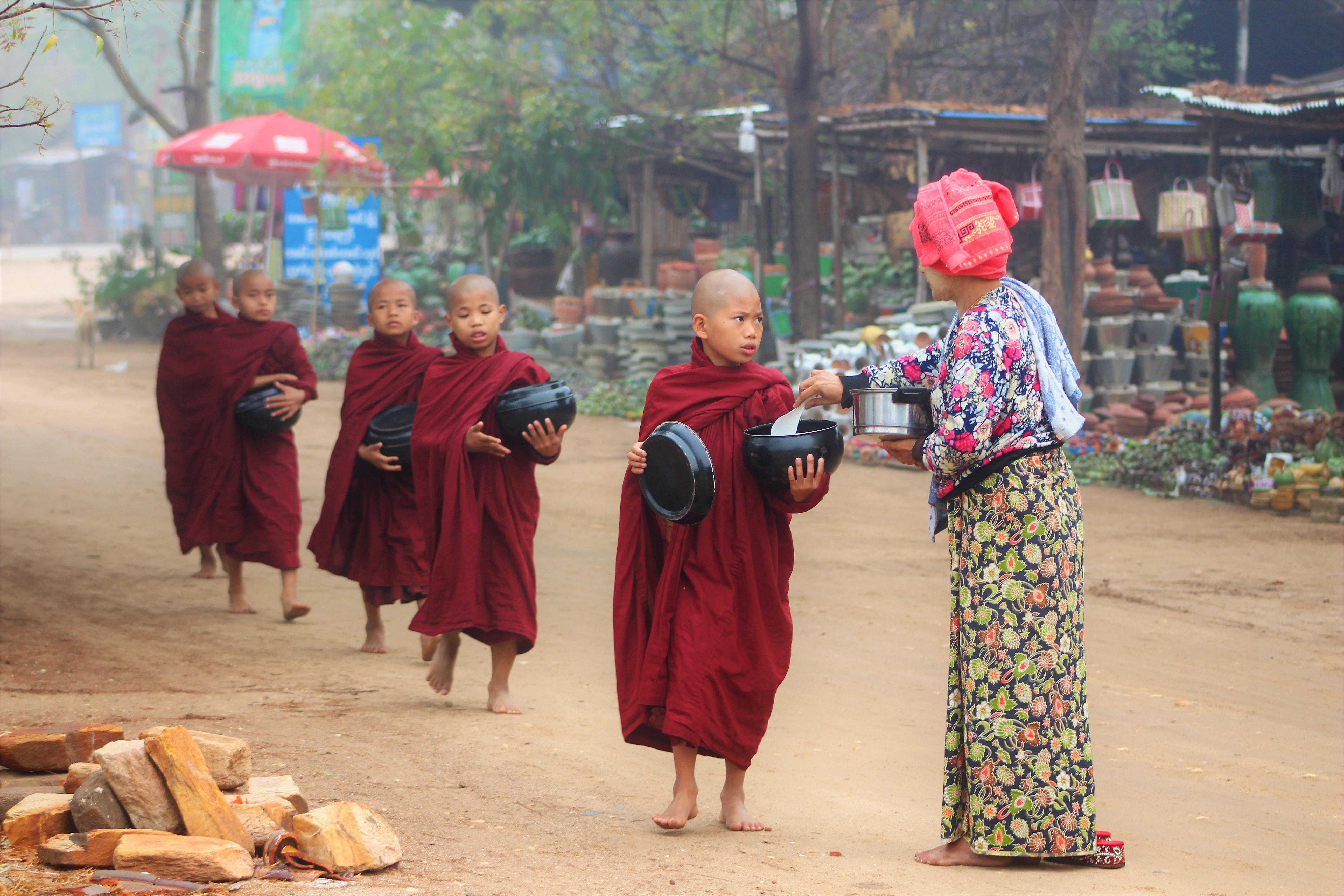 မြန်မာဘာသာ: ဗုဒ္ဓဘာသာဝင်တို့၏ ချစ်စရာအလွန်ကောင်းတဲ့ ဓလေ့ရိုးရာတစ်ခုဖြစ်သော နံနက်ခင်းချိန် ကိုရင်လေးများကို ဆွမ်းလောင်းနေသော ကြည်နူးဖွယ်ရာမြင်ကွင်းပုံ။